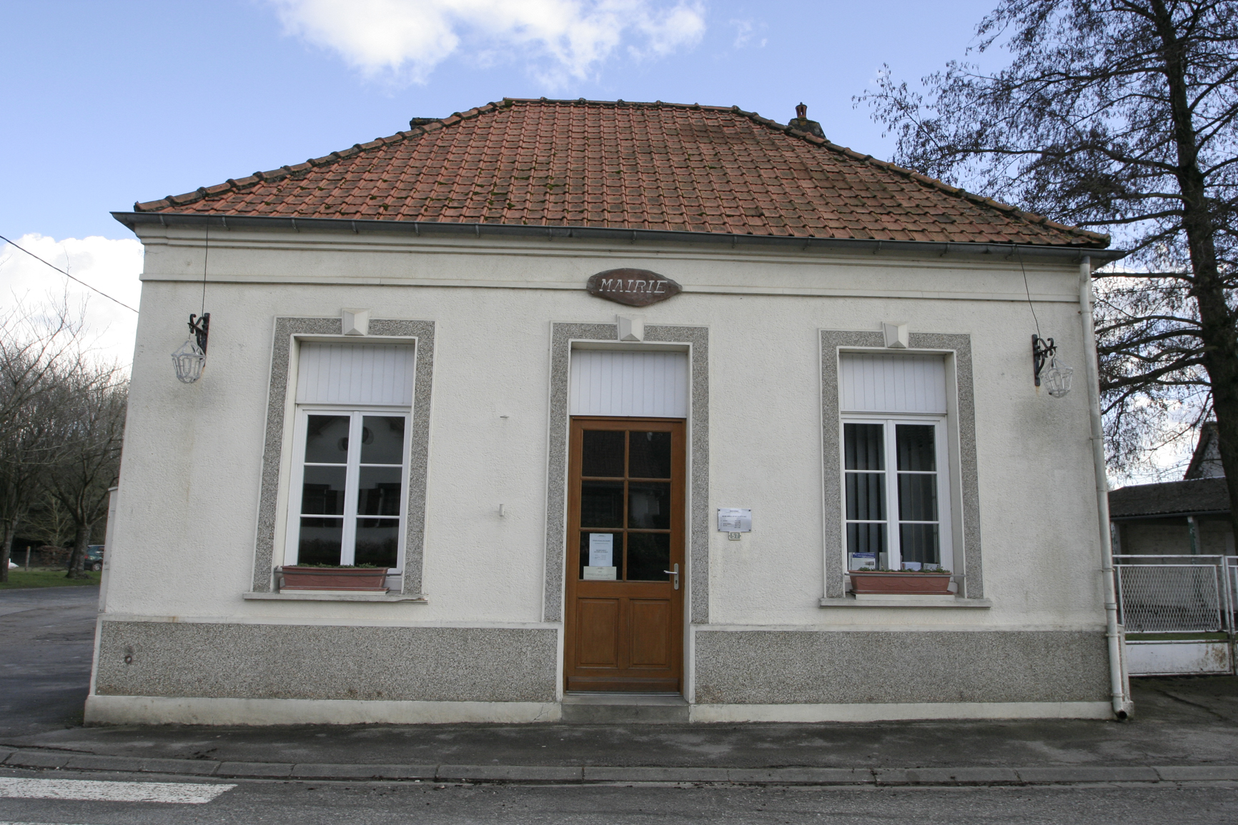 Estréelles mairie